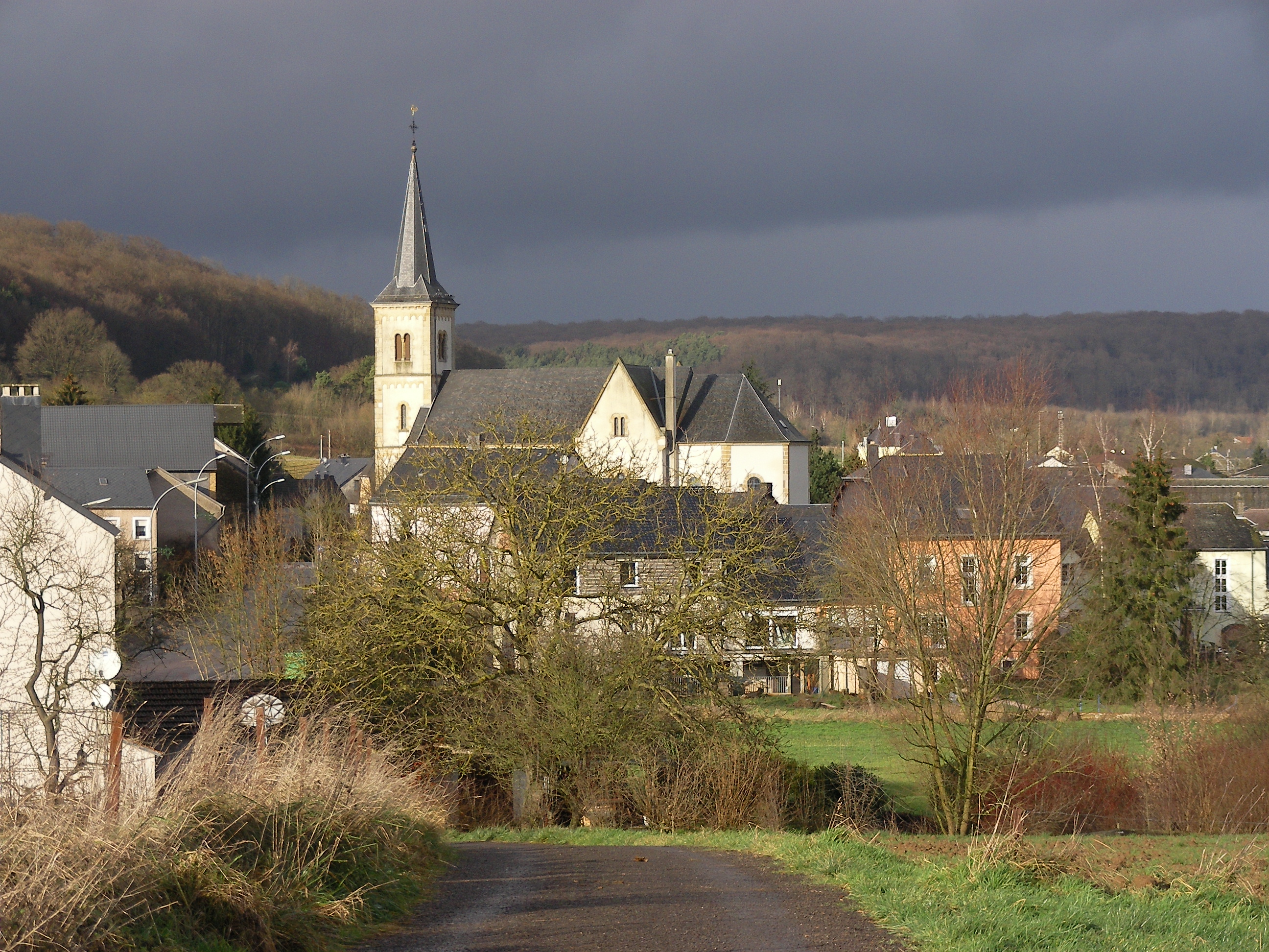 Blick auf der Dorfkern von Oetrange (Éiter, Oetringen) in Luxemburg